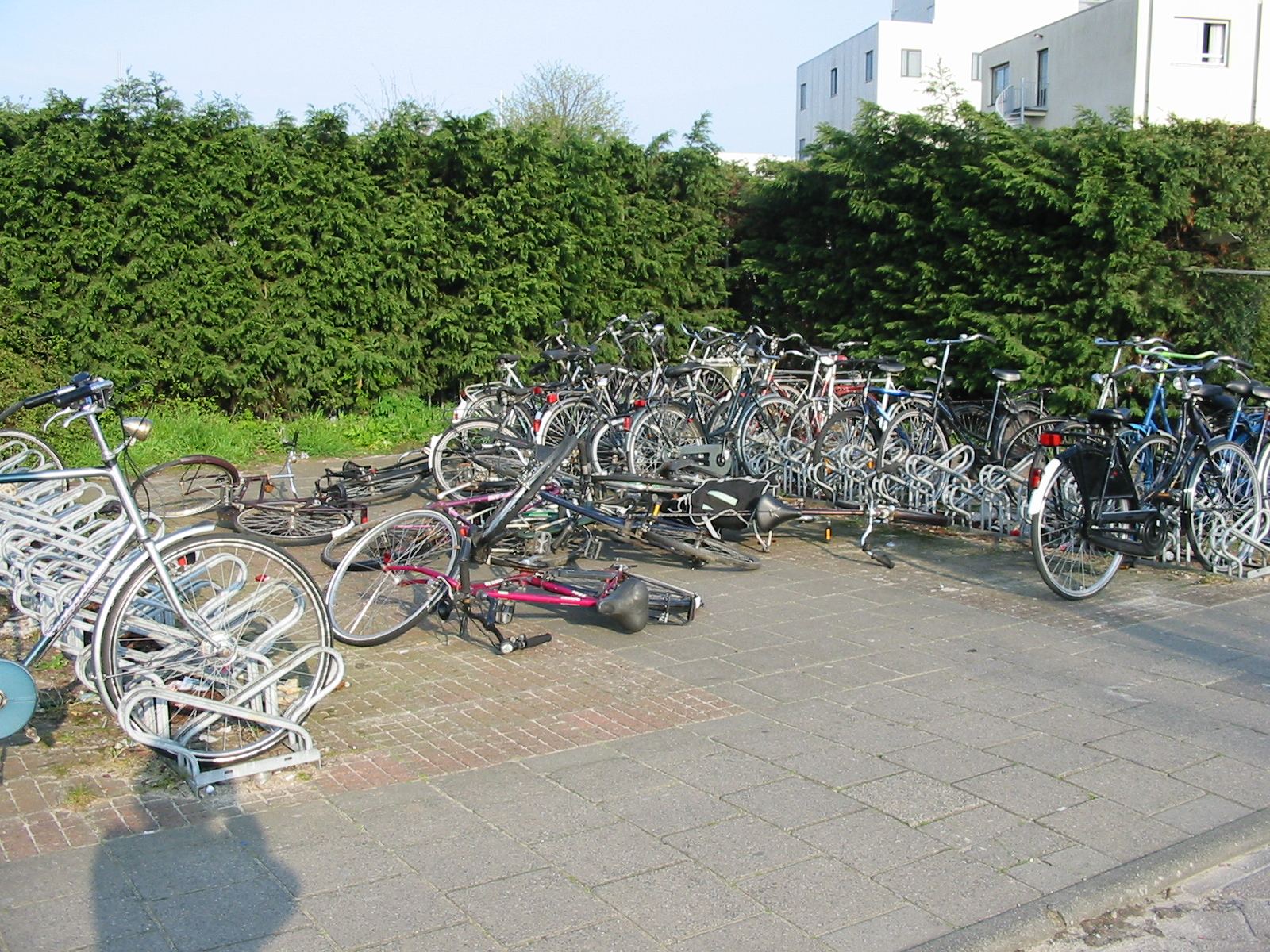 Vandalisme_fietsen_bij_station_alphen_aan_den_rijn_april_2007